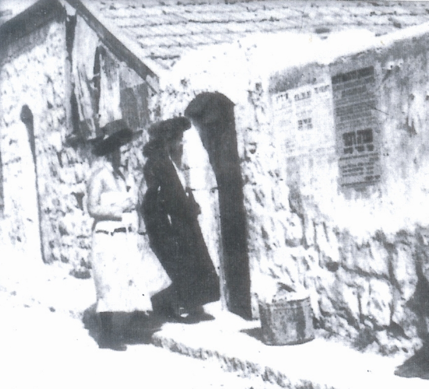 האדמו"ר רבי אברהם יצחק קאהן ובנו בפתח בית הכנסת הישן במאה שערים. רישיון נוצר על ידי משתמש:יהודה מלאכי